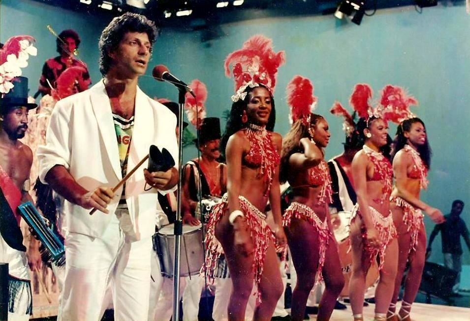 מתי כספי ארץ טרופית יפה